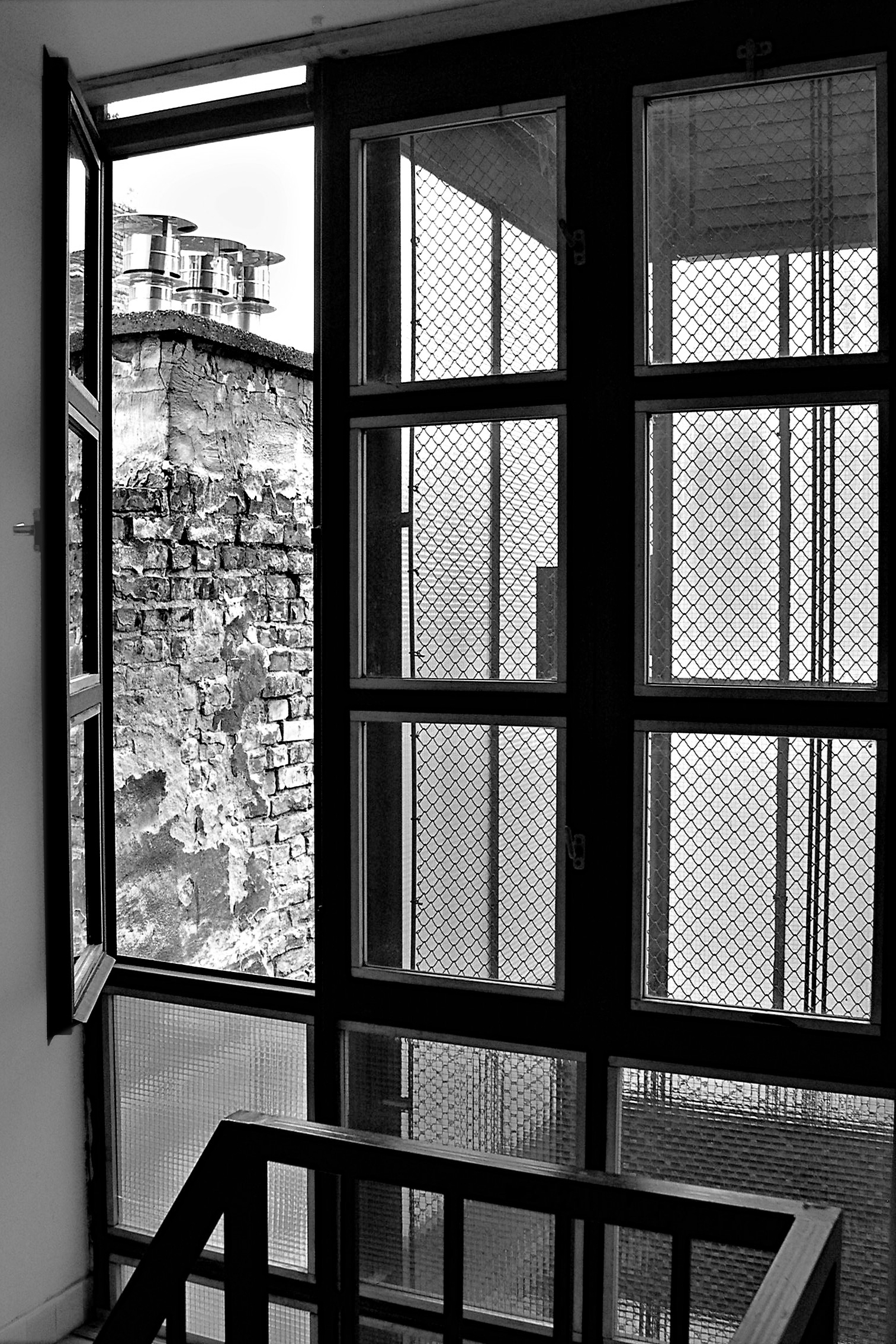 Lépcsőház, Budapest, VII, kerület